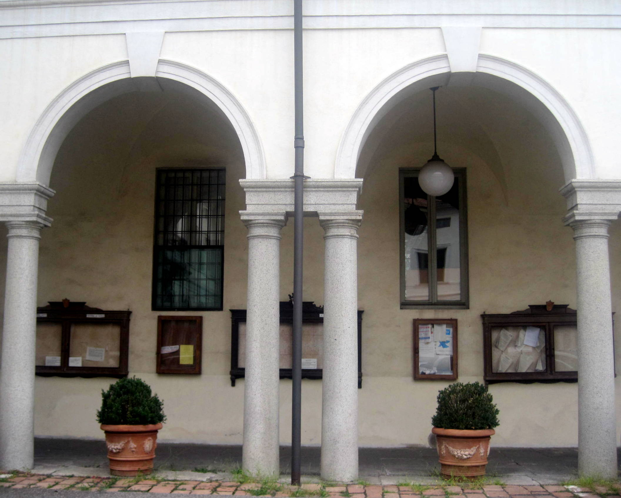 Palazzo Gilardoni - Municipio This is a photo of a monument which is part of cultural heritage of Italy.